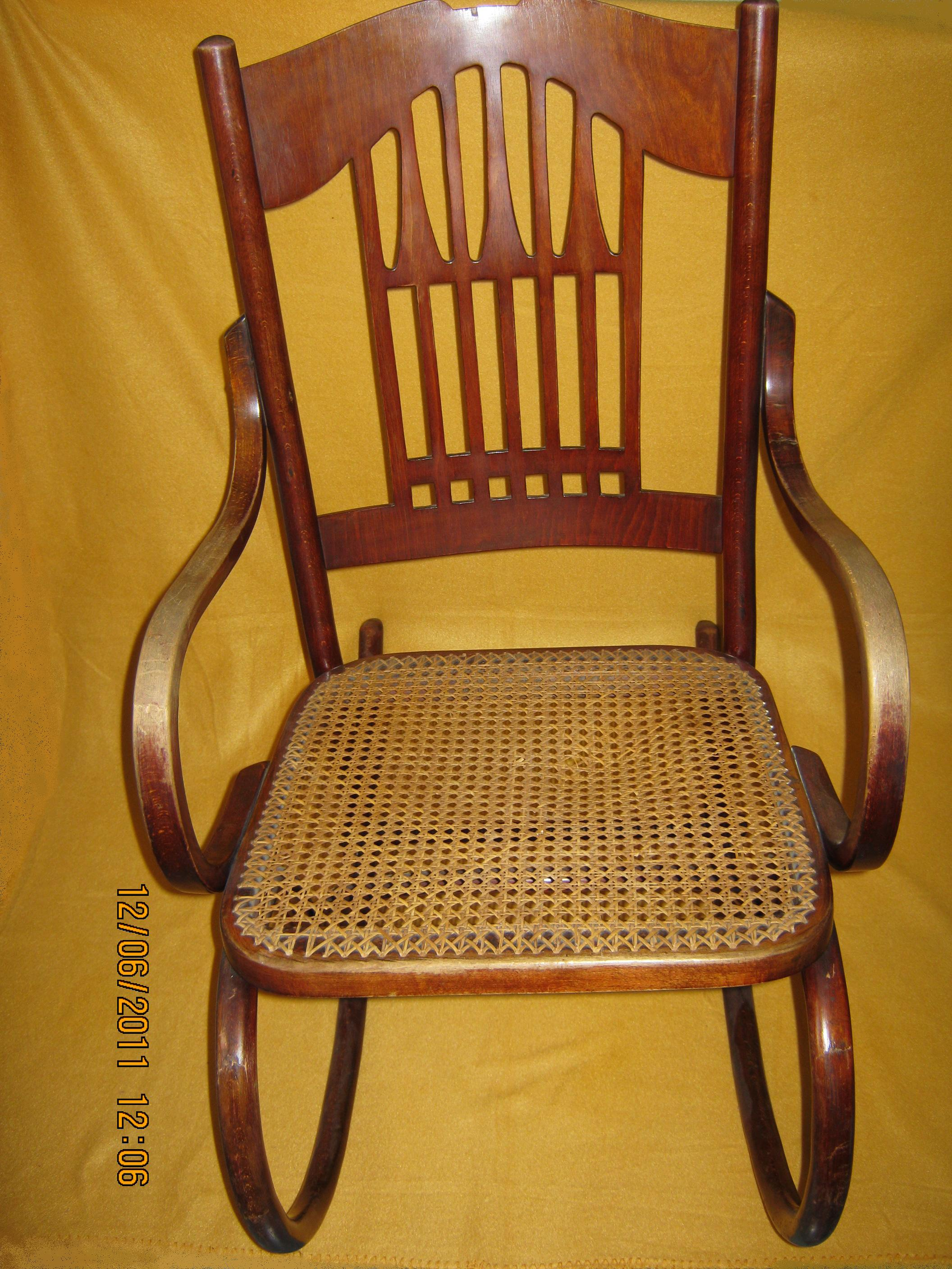 Schaukelstuhl von Jacob & Josef Kohn